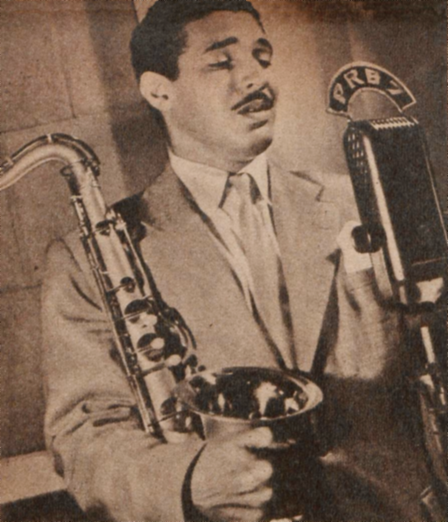 Dorival Caymmi (Salvador, 30 de abril de 1914 – Rio de Janeiro, 16 de agosto de 2008) foi um cantor, compositor, violonista, pintor e ator brasileiro.